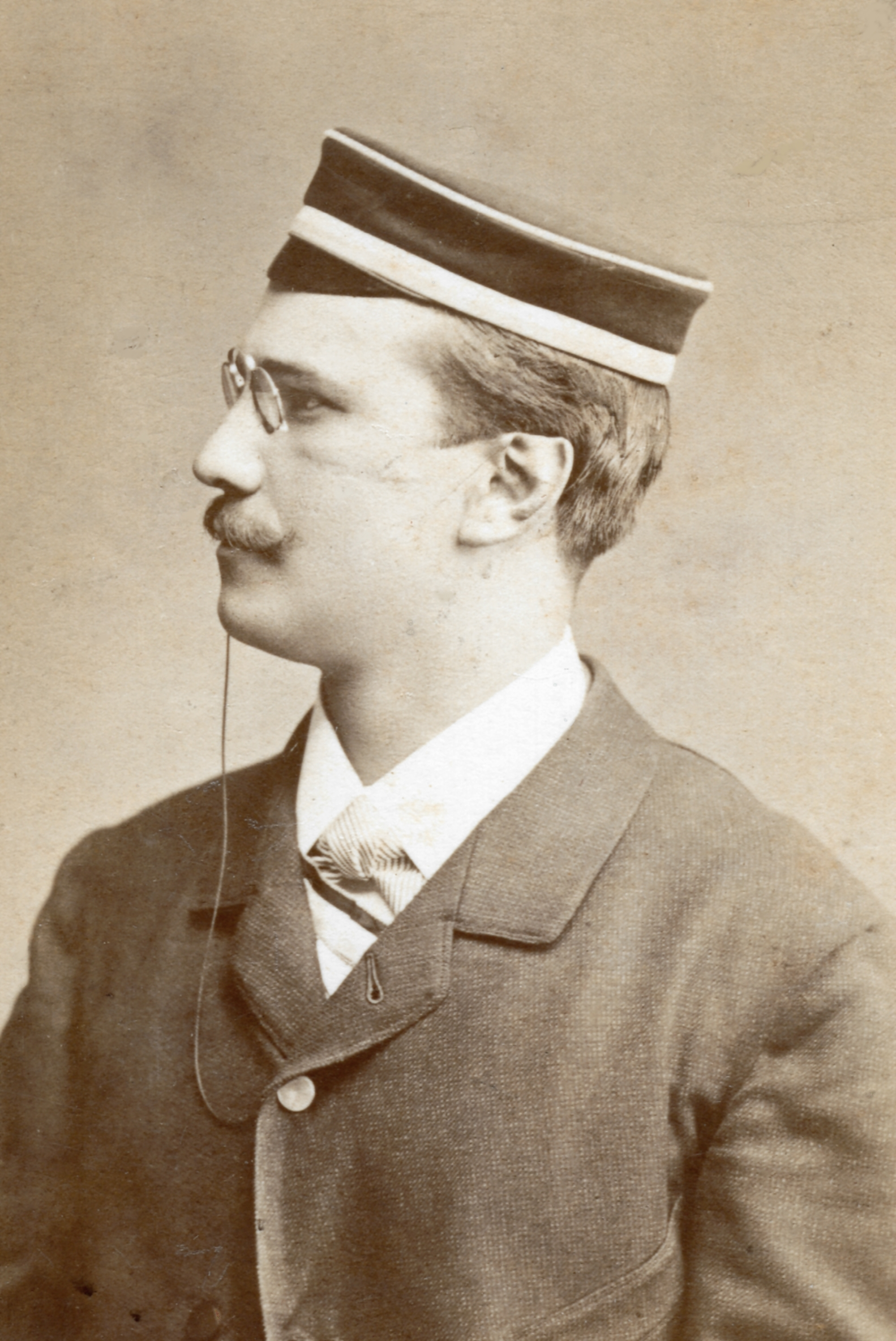 Fotografie im Seitenprofil von Karl Dyroff als Corpsbursche der Suevia München